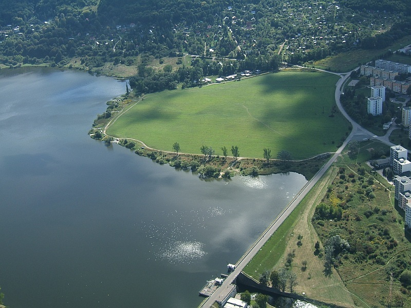 Sekier - priehrada